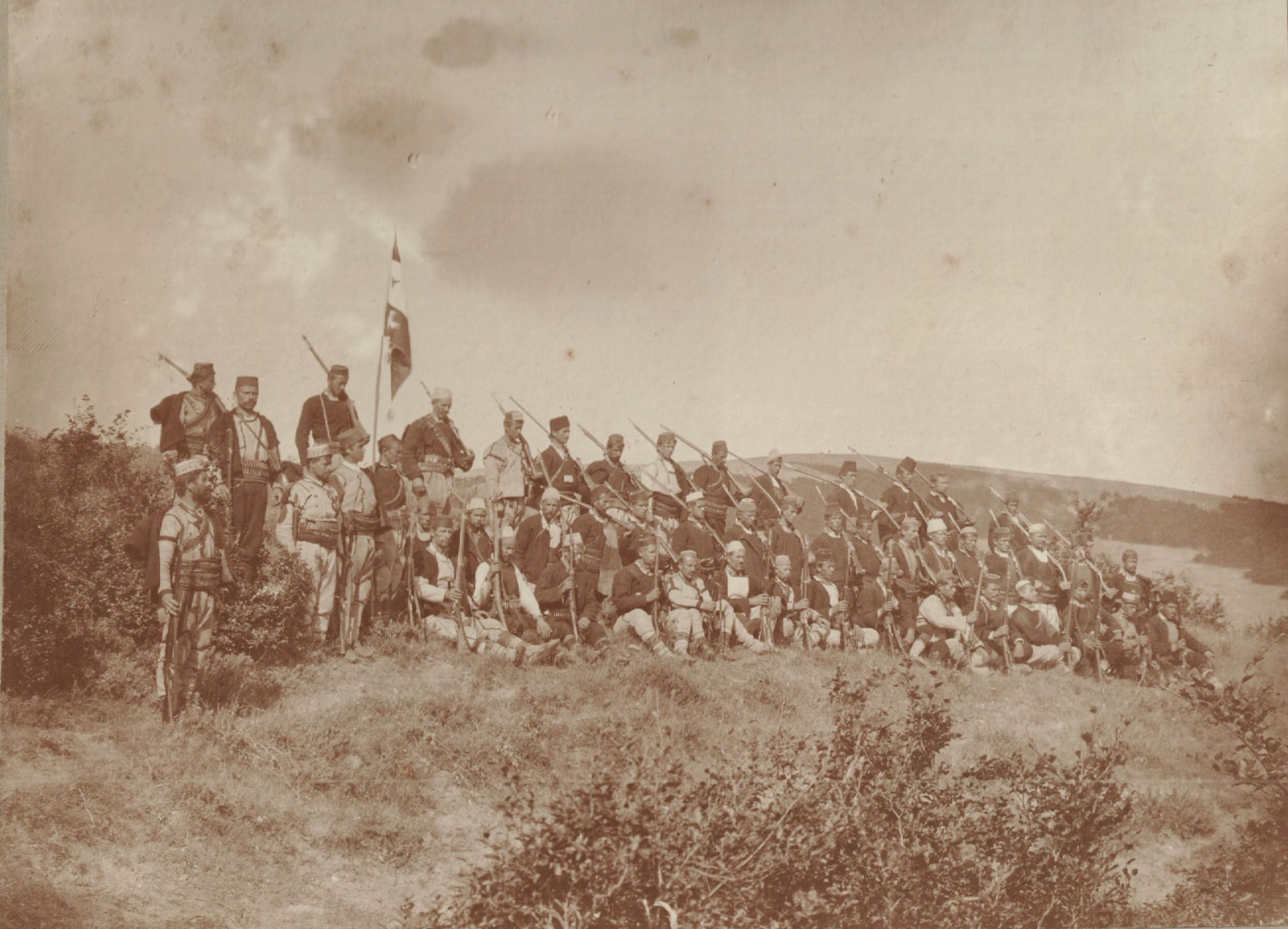 Снимка на четата на Марко Христов. Въстанието в Крушово.